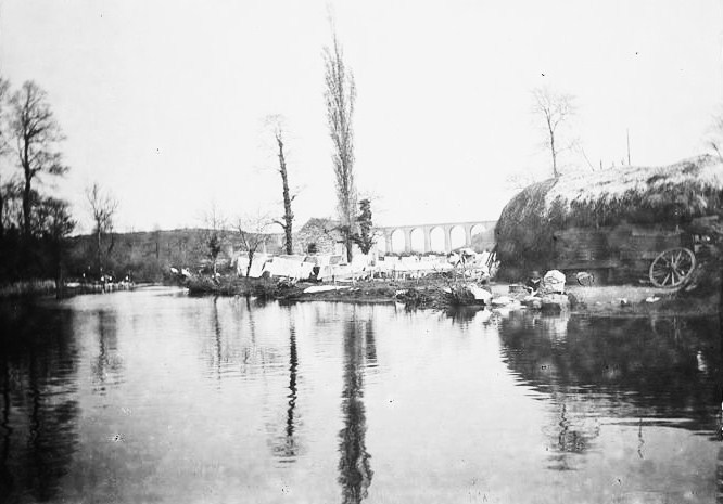 Etang et viaduc de Daoulas. Lavandière. Draps séchants (photo datée de 1893 prise par Paul Lancrenon [1857-1922], Ministère de la Culture (France) - Médiathèque de l'architecture et du patrimoine - diffusion RMN)